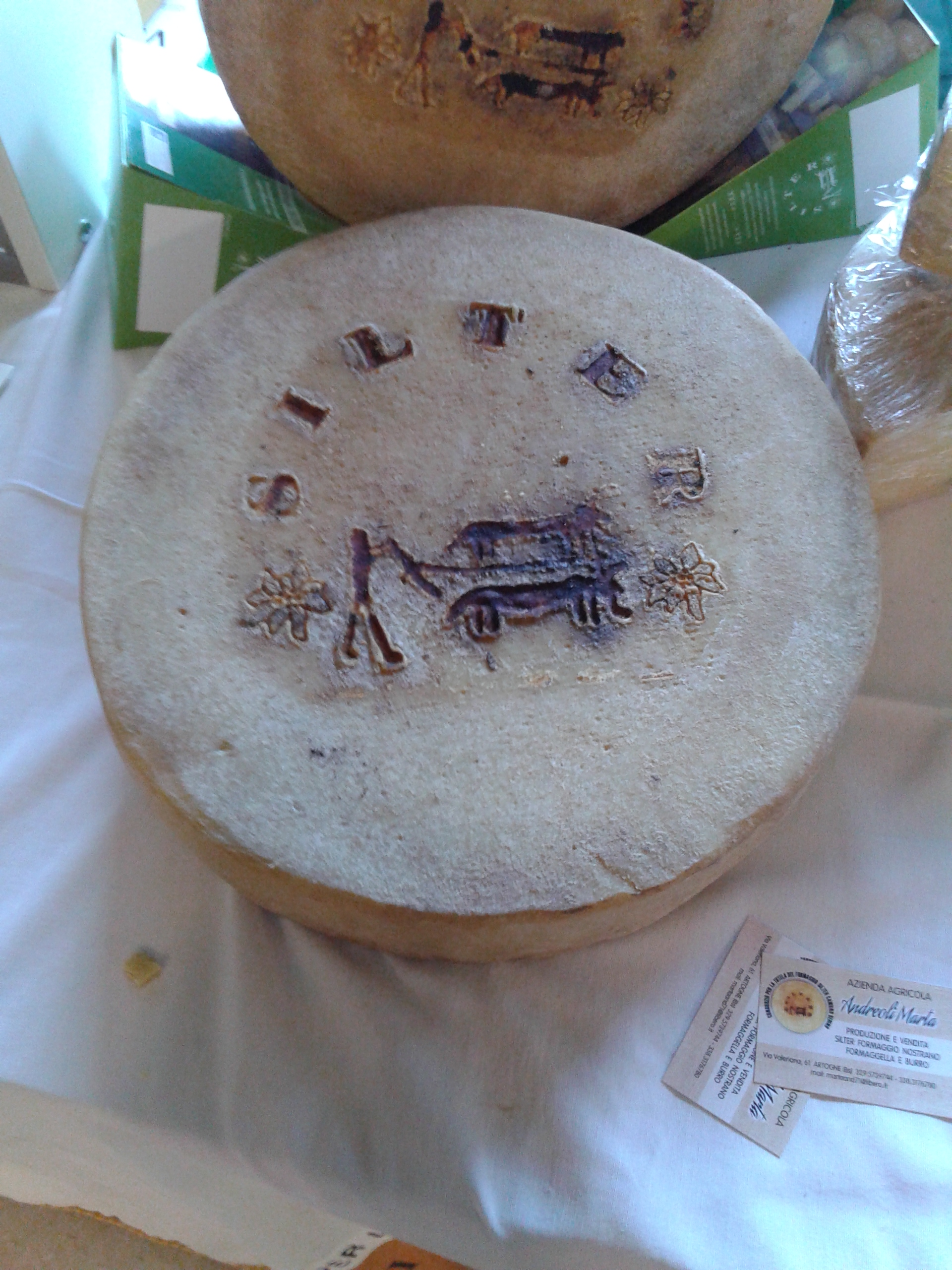 Silter DOP (formaggio bresciano)